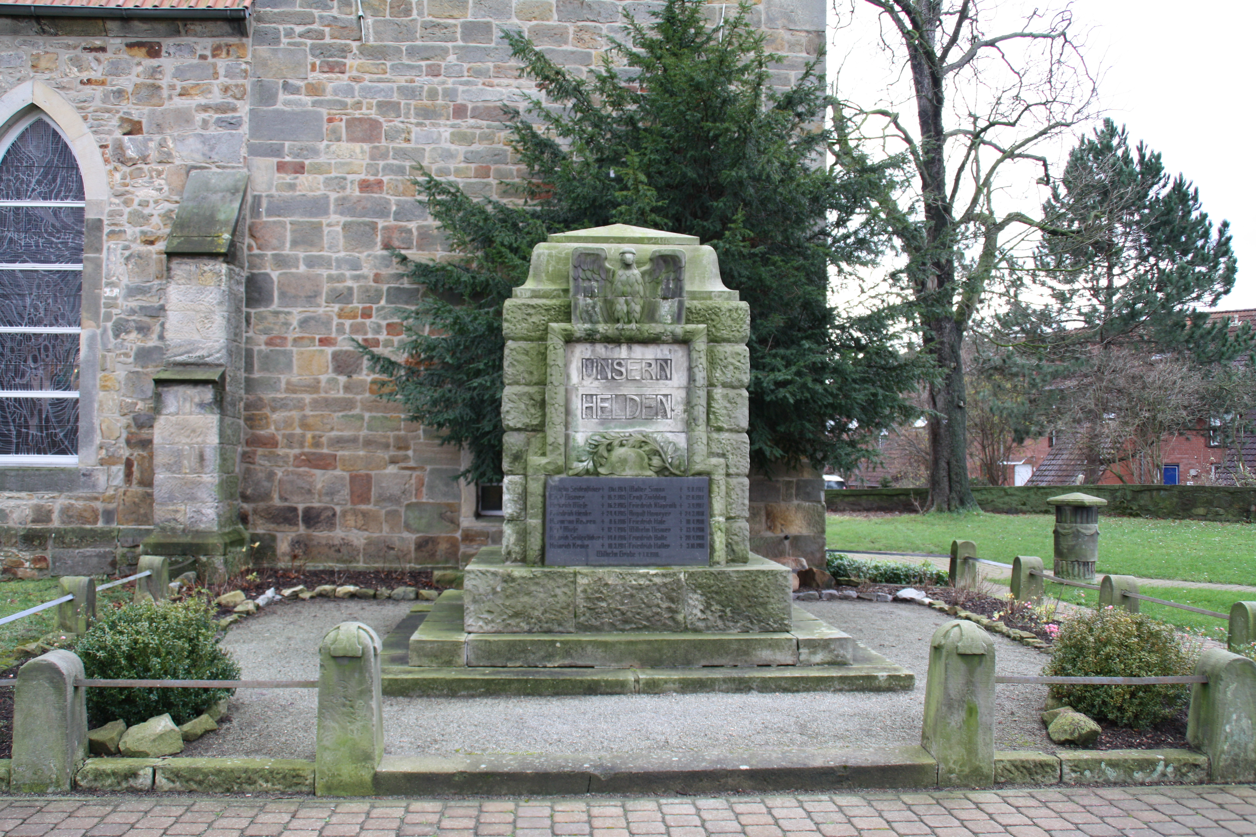 Das an der nordwestlichen Ecke der Holtenser Kirche befindliche Denkmal zum Gedenken an die in den Kriegen Gefallenen